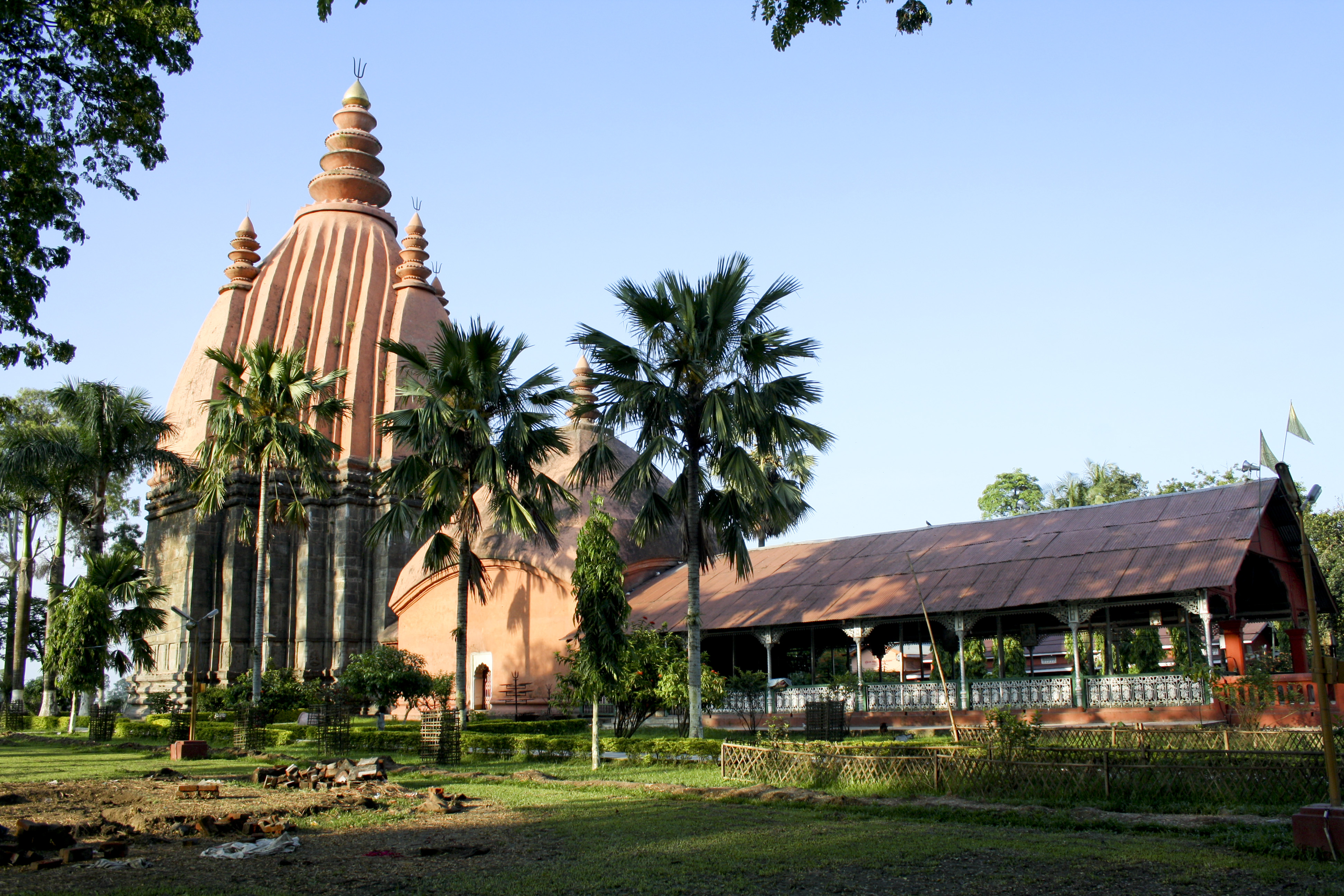 Sibasagar Shiva Doul